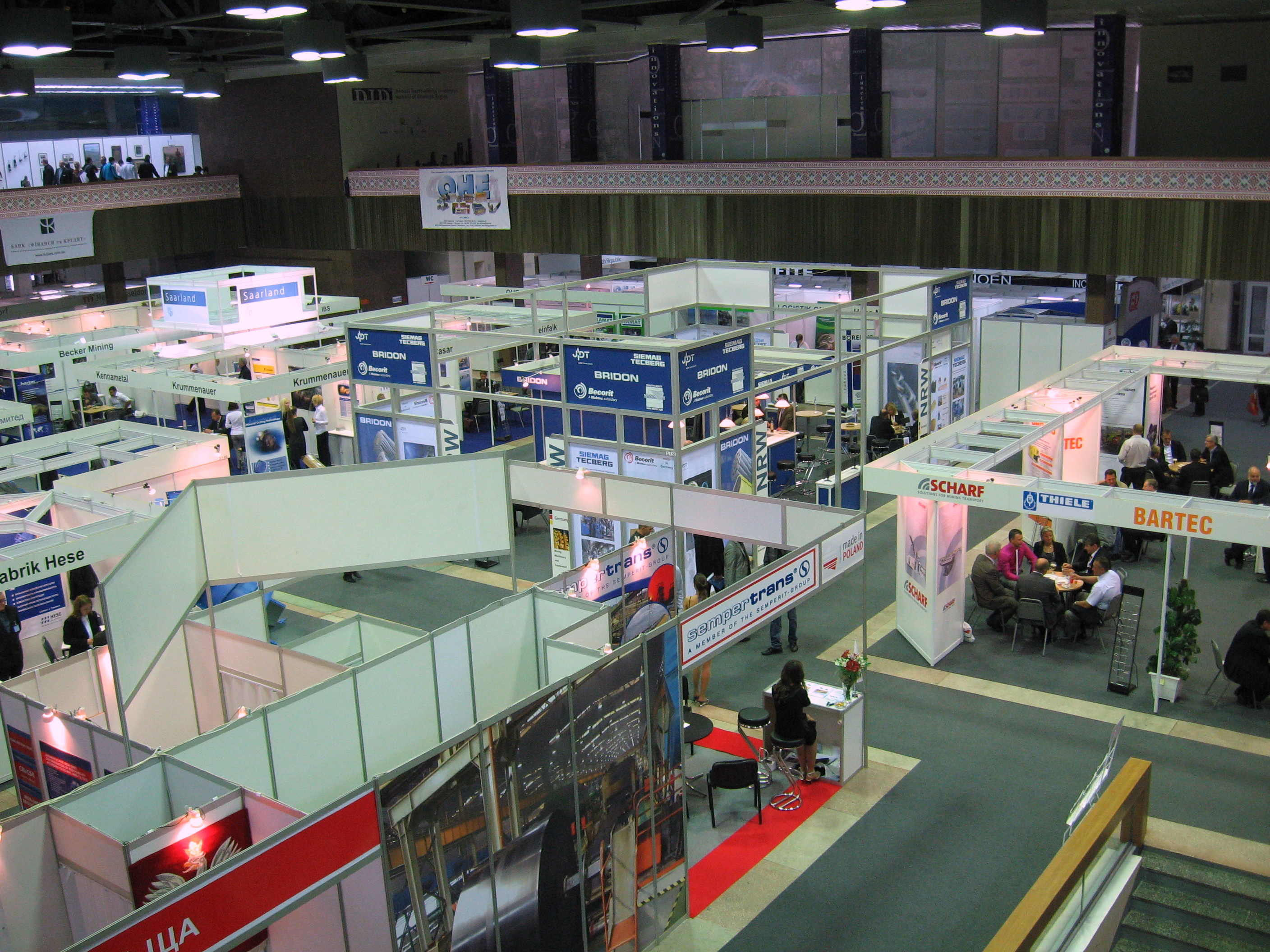 Фото з виставки Вугілля-Майнінг 2010